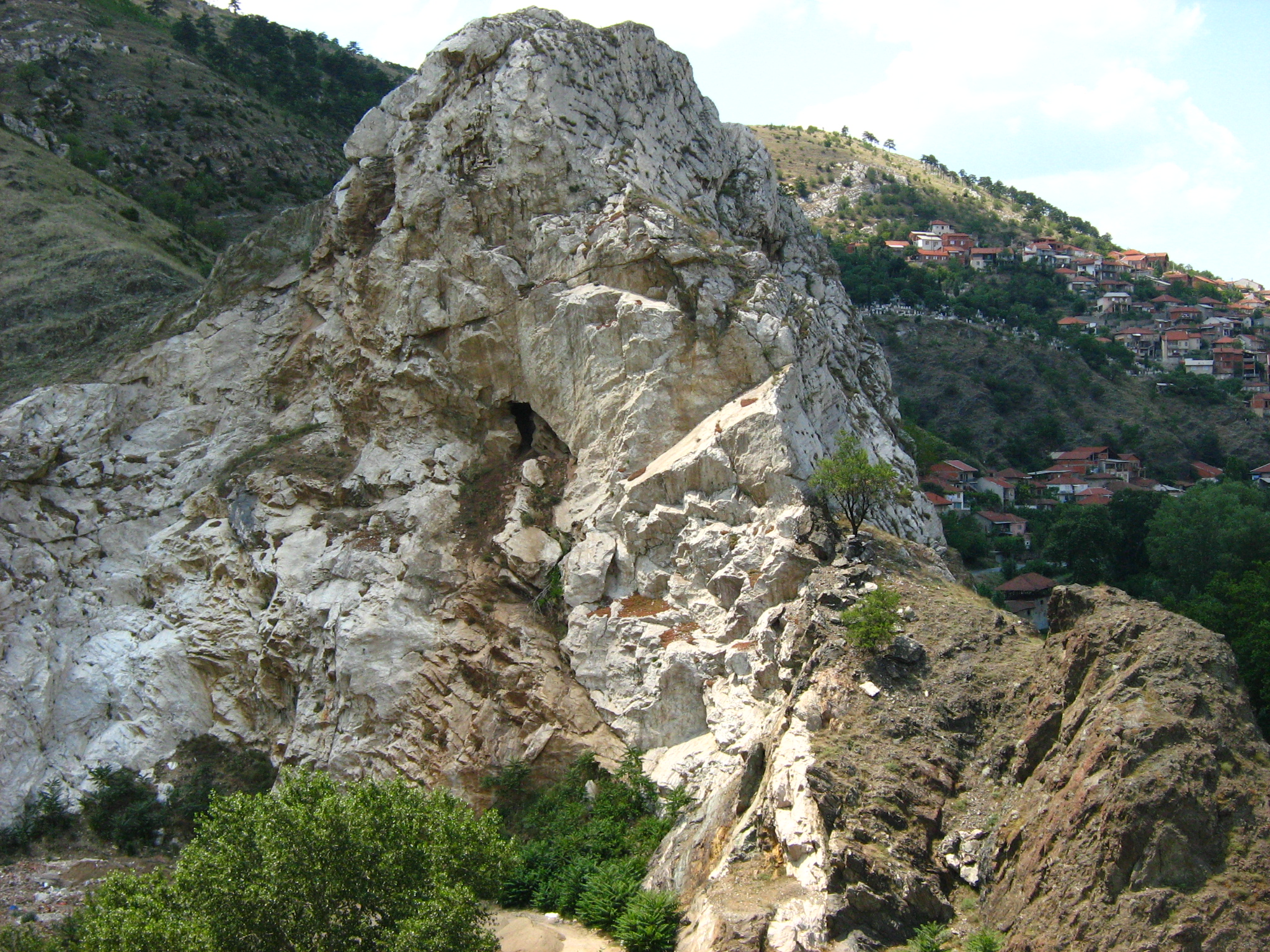 Карпата Цуцка во Велес